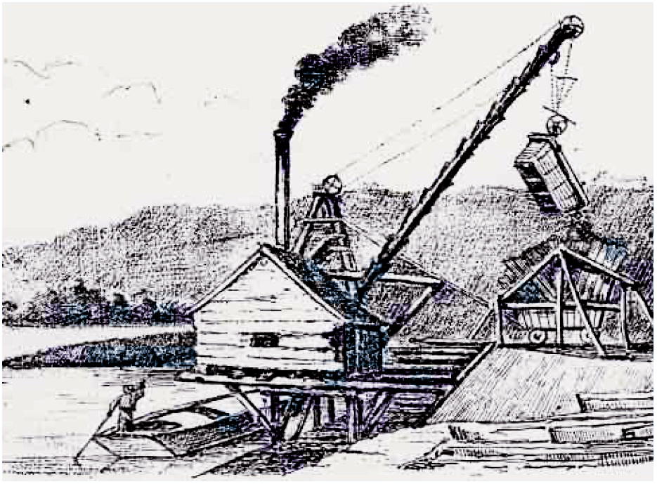 Grue déchargeant un bateau de transport lors des travaux du canal de Nidau-Büren.